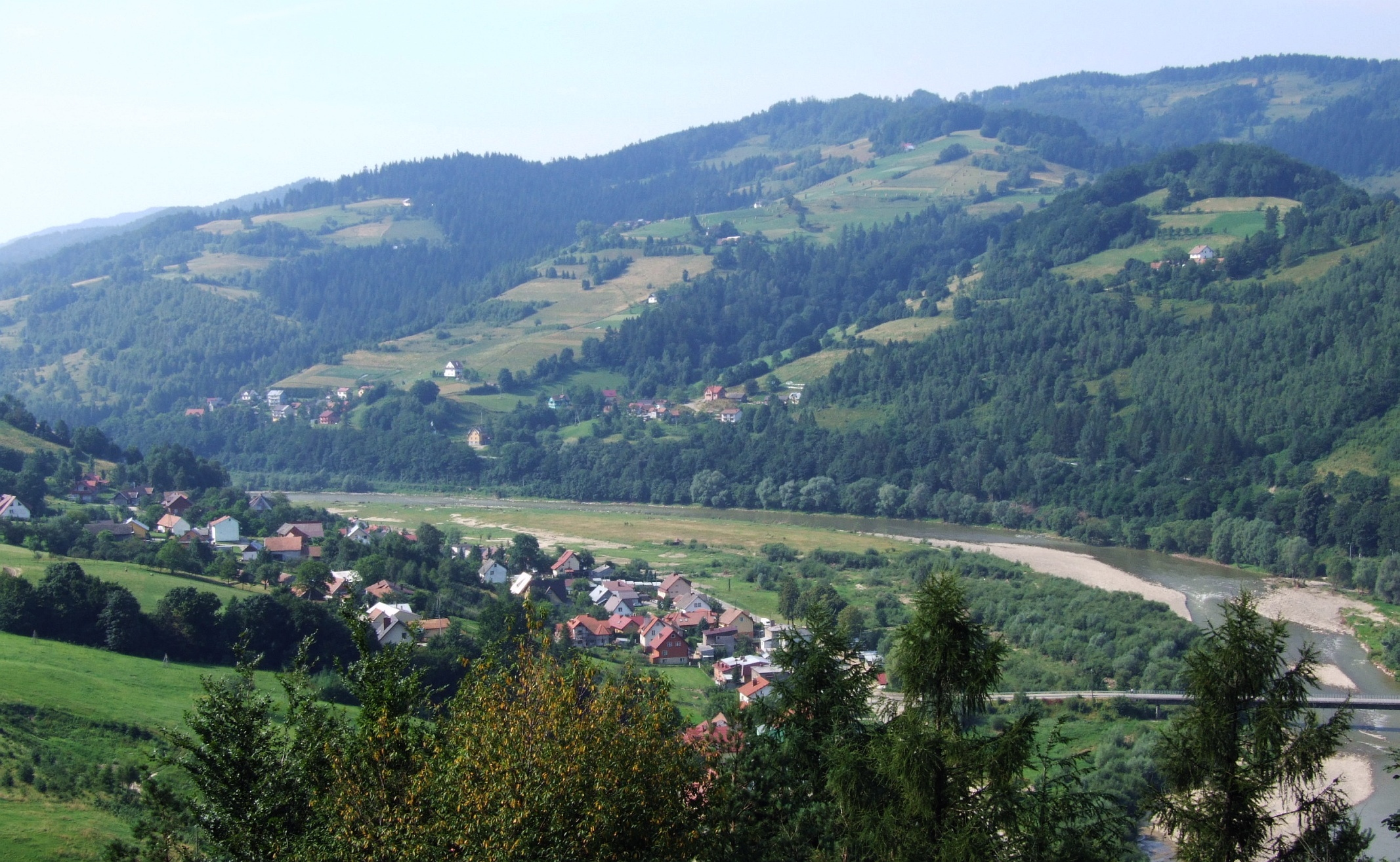 Sucha Struga i Poprad. Widok z zamku w Rytrze